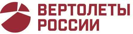 Официальный логотип холдинга Вертолеты России с 29 декабря 2015 года